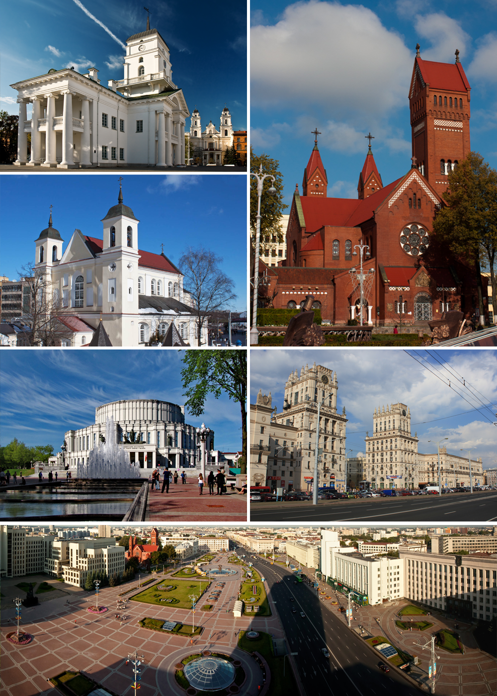 Коллаж для страницы о Минске